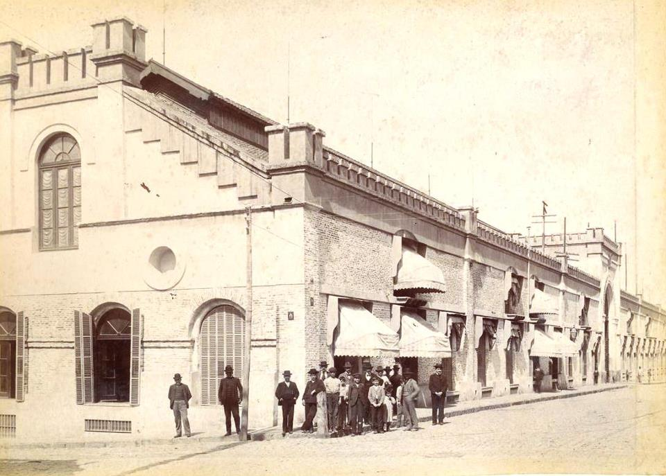 Vista de los Depósitos de Aduana, luego Intendencia de Marina e Intendencia de Guerra. Demolidos en la década de 1960. Hoy está allí el Comando Antártico del Ejército. Buenos Aires, Argentina.